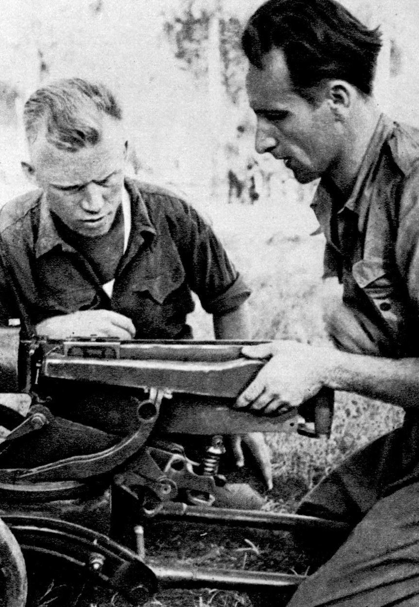 Fadil Jahić uvežbava rasklapanje mitraljeza u Španiji.